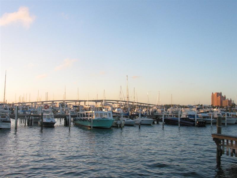 Harbour, Nassau, BahamasMy Photo Essay 2002 091 (Medium)